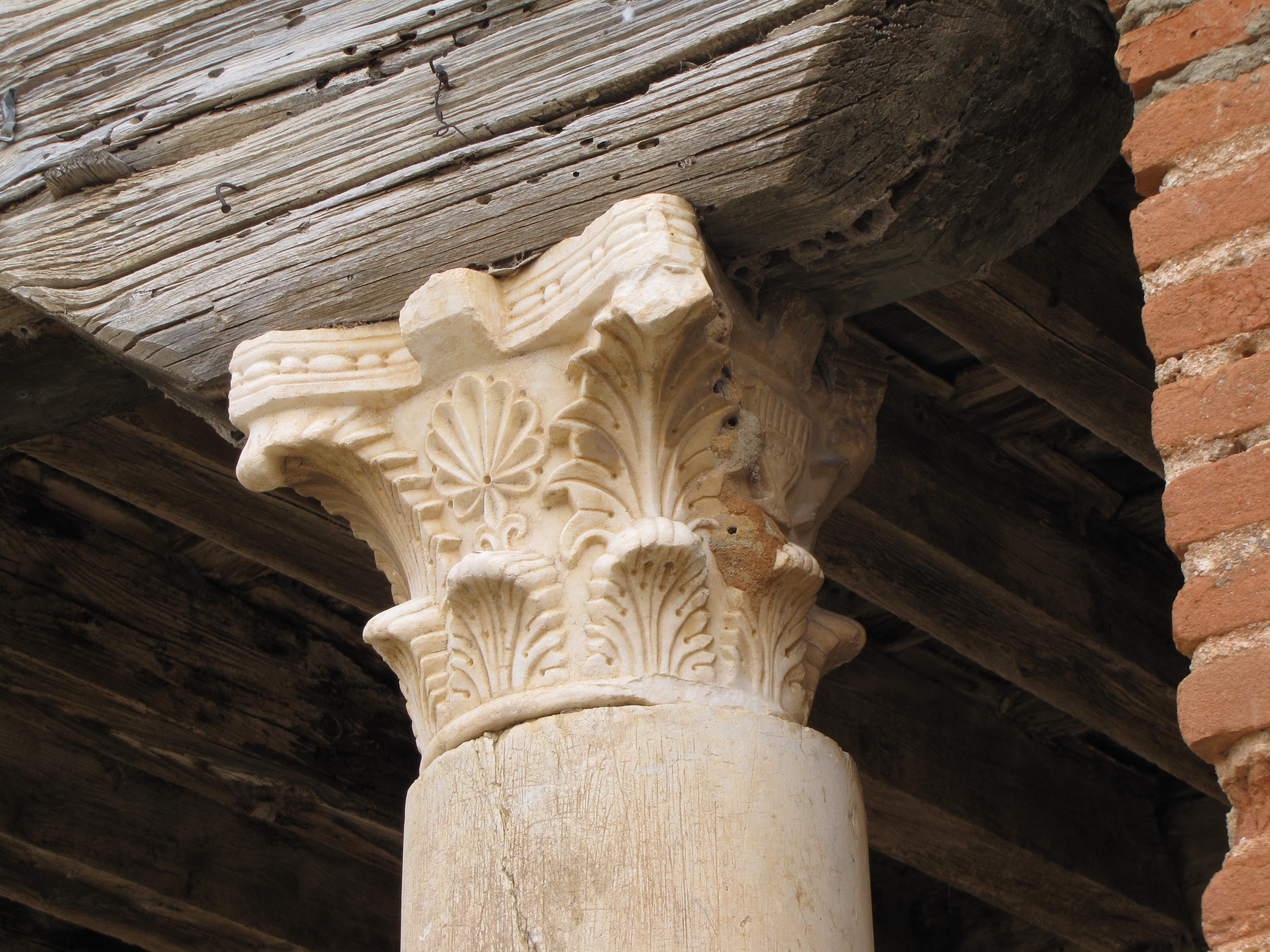 Iglesia parroquial - Capitel en edificio anexo 2